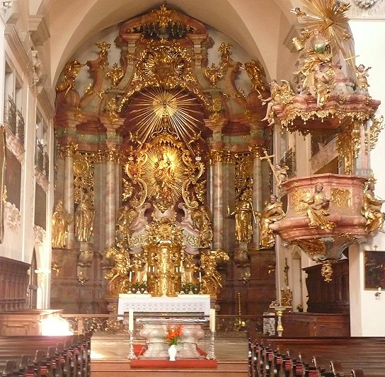 Hochaltar und Kanzel in der Marienkirche in Steyr